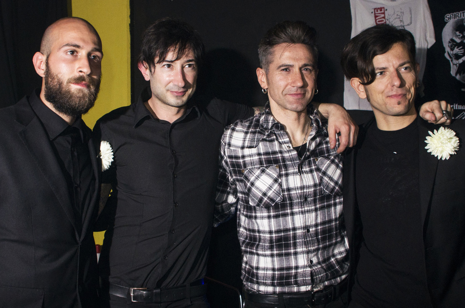 Spiritual Front a Padova l'11 aprile 2014